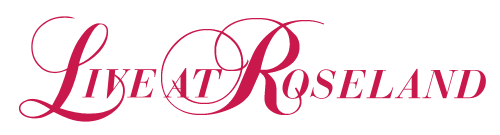 Categoria:Imagens de Beyoncé Knowles